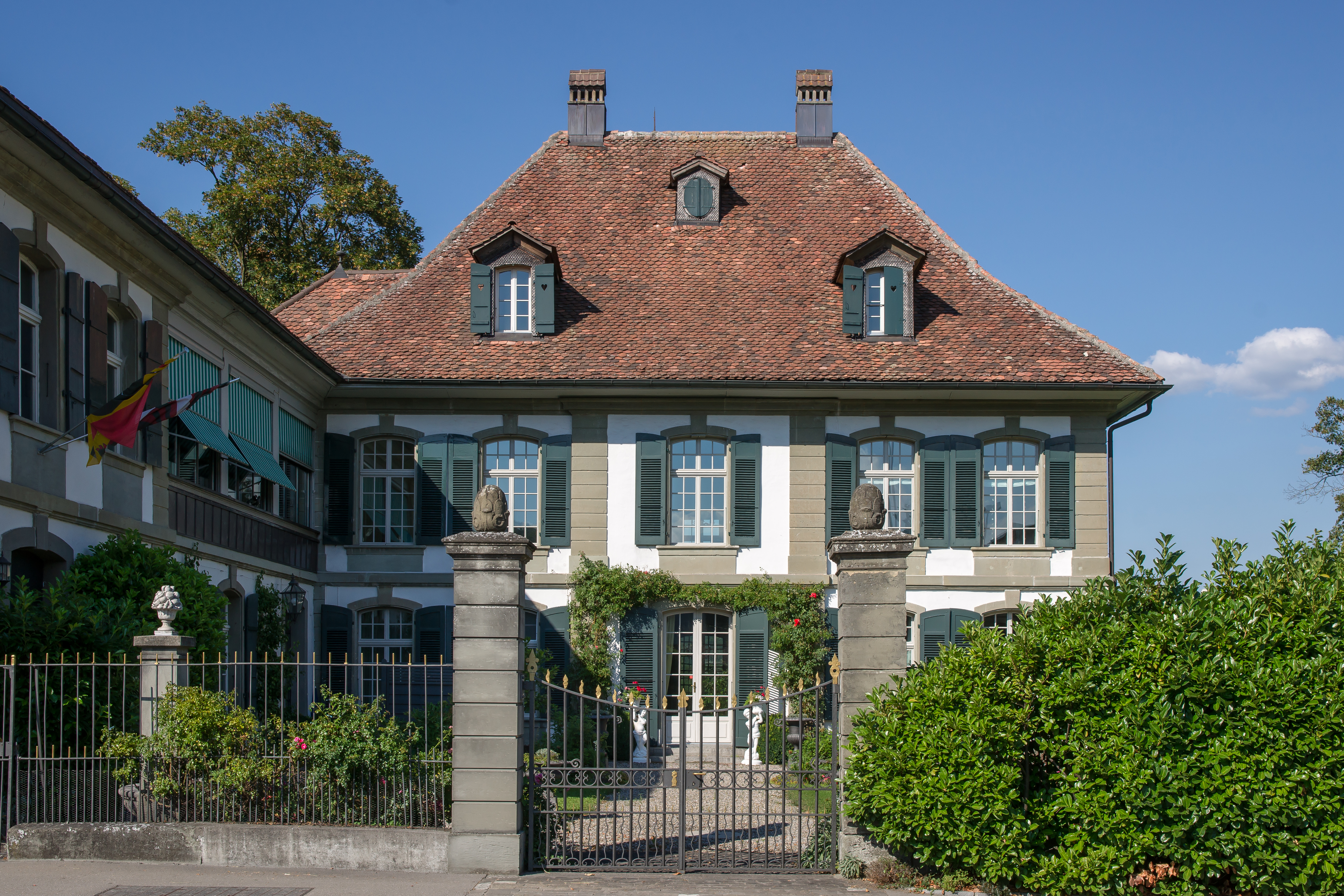 Neubau (Neues Schloss) von Westen